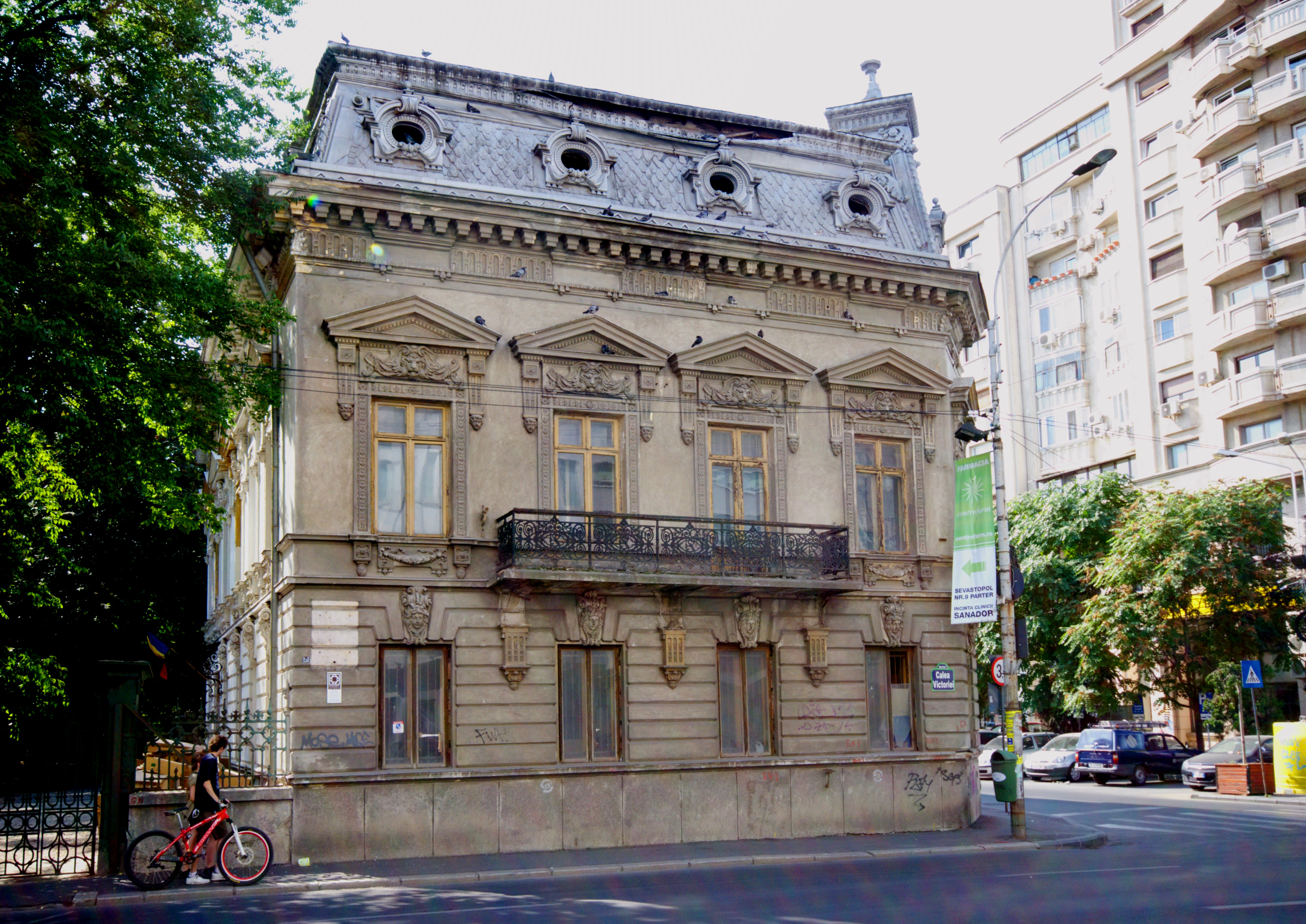 Casa Cesianu, Calea Victoriei 151